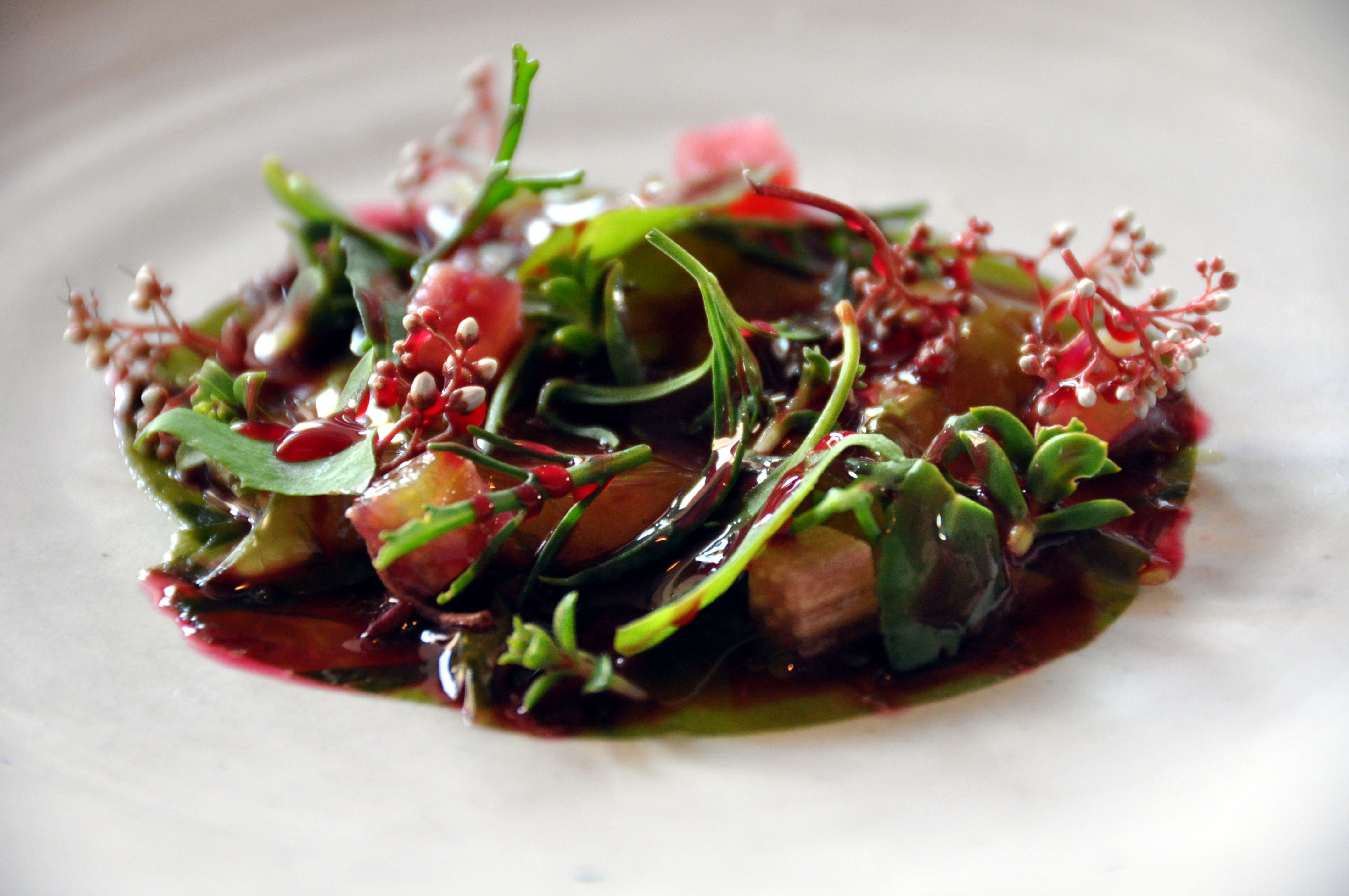 Rå rejer med tang, rabarber og urter